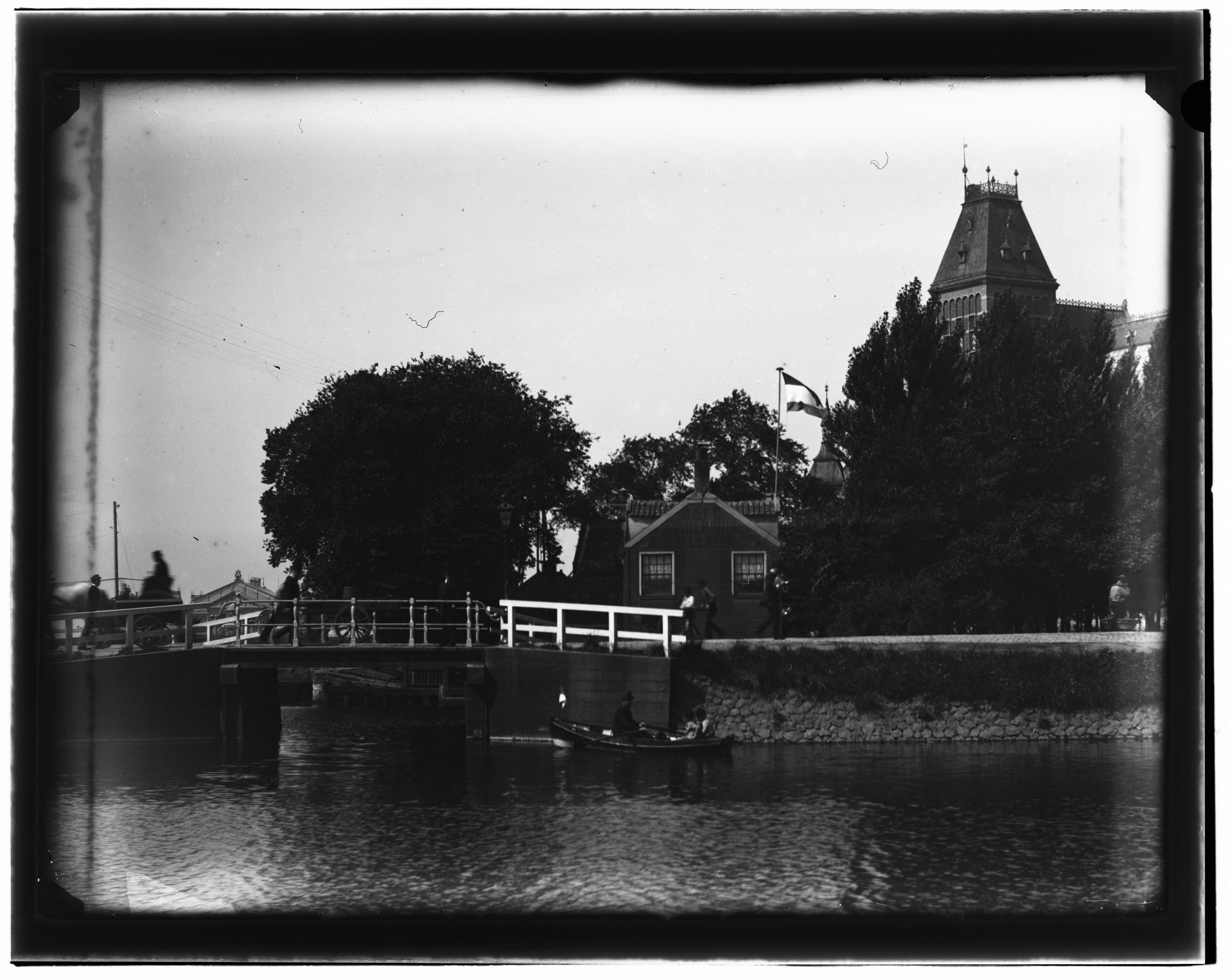 Beschrijving Singelgracht Boerenwetering/Polderhuis met brug nr.176. Rechts: toren Rijksmuseum``,Stadhouderskade nr.42 Documenttype foto Vervaardiger Olie``, Jacob (1834-1905) Collectie Collectie Jacob Olie Jbz. Datering 1890 Geografische naam Singelgracht Inventarissen Afbeeldingsbestand 10019A000692 Generated with Dememorixer